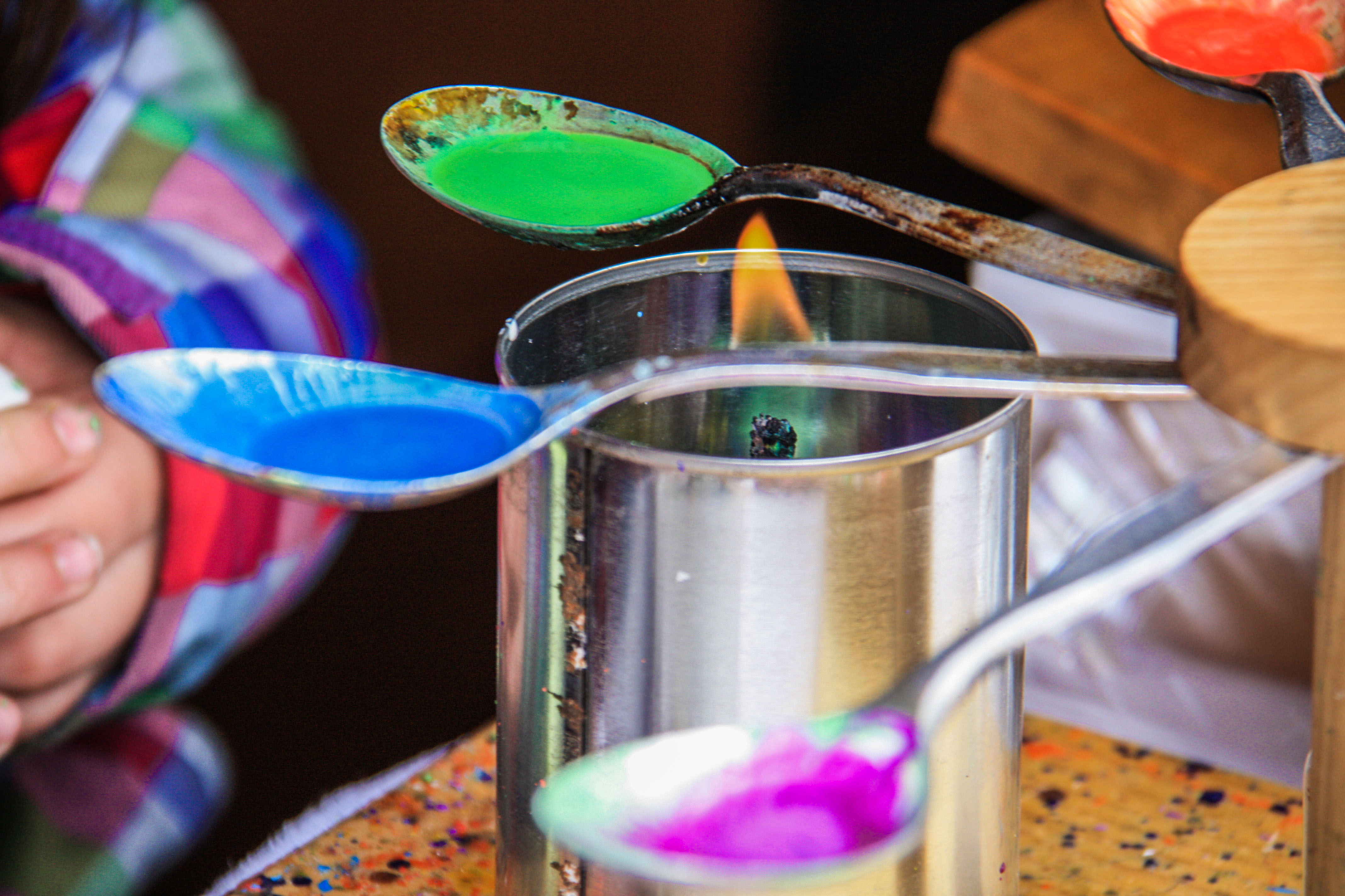 Urządzenie podgrzewające kolorowy wosk do malowania pisanek podczas jarmarku wielkanocnego w Valašské muzeum v přírodě – skansen na Morawskiej Wołoszczyźnie znajdujący się w mieście Rožnov pod Radhoštěm.